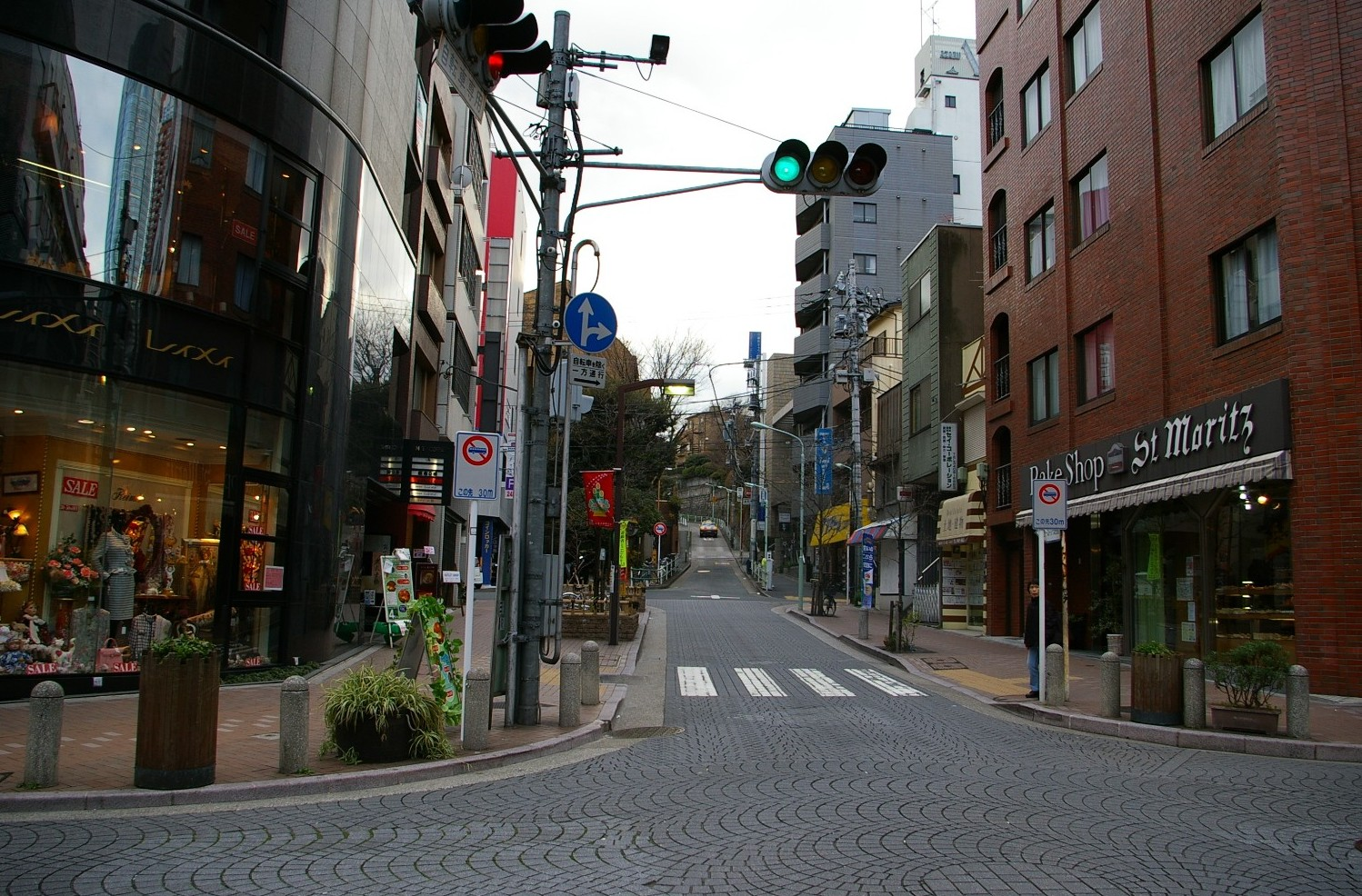 Ich machte dieses Foto von mir in 2006.